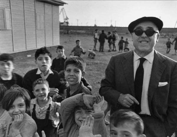 Napoli - Vittorio De Sica e Cesare Zavattini in città per la preparazione del film "L'oro di Napoli" - Cesare Zavattini con un gruppo di bambini